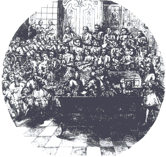 GFHandel regendo um oratório